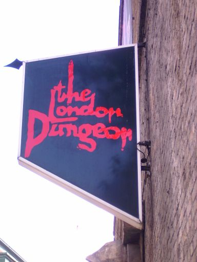 Selbst fotografiert am 09. Mai 2005 Swgreed 22:14, 12. Mai 2005 (CEST)